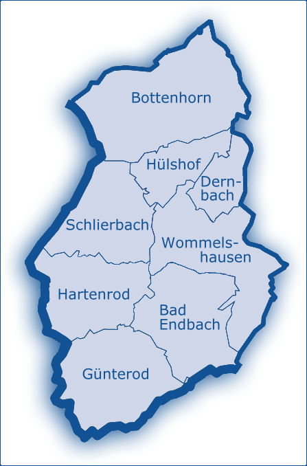 Ortsteile der Gemeinde Bad Endbach